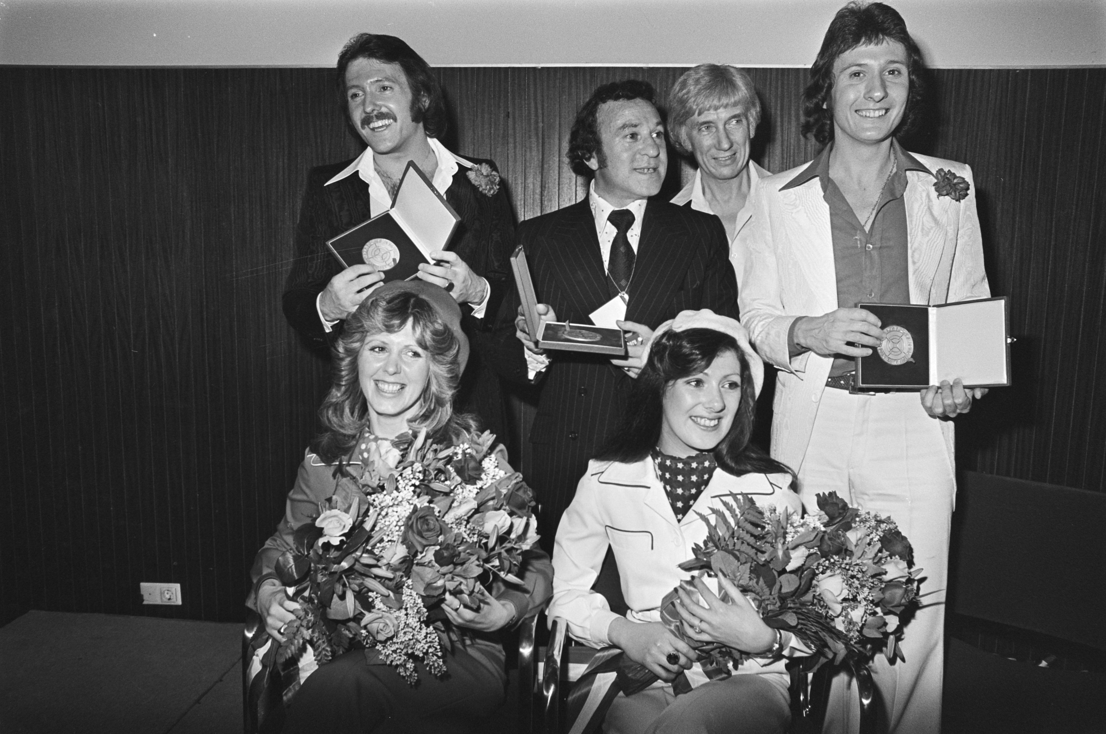 Collectie / Archief : Fotocollectie Anefo Reportage / Serie : [ onbekend ] Beschrijving : Eurovisie Songfestival 76 Den Haag ; Brotherhood of Man (Engeland) met de medailles Datum : 3 april 1976 Locatie : Den Haag, Groot-Brittannië Trefwoorden : MEDAILLES, songfestivals Persoonsnaam : Brotherhood of Man, Eurovisie Songfestival Fotograaf : Mieremet, Rob / Anefo Auteursrechthebbende : Nationaal Archief Materiaalsoort : Negatief (zwart/wit) Nummer archiefinventaris : bekijk toegang 2.24.01.05 Bestanddeelnummer : 928-5009